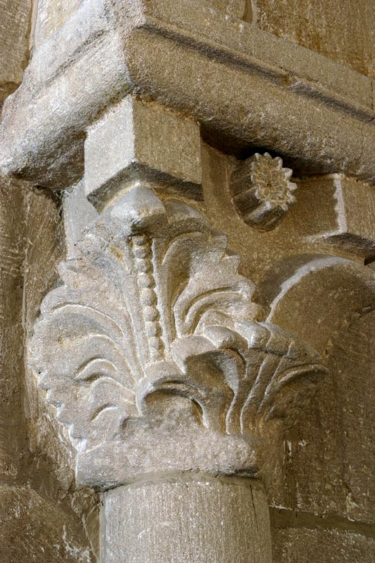 Chapiteau du choeur de l'église de Ligny-en-Brionnais